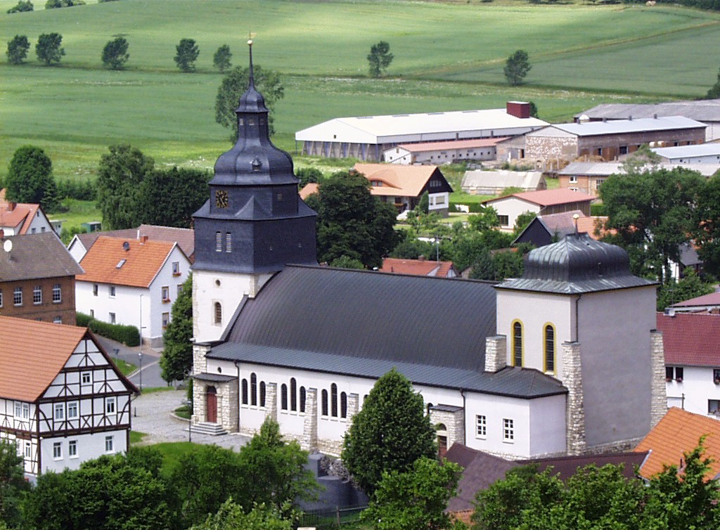 Bischofferode im Eichsfeld - Kirche "Maria Geburt" Veröffentlichung durch Wikipedia genehmigt - Copyright "Das Archiv für technische Dokumente 1900-1945" - - 08/2005